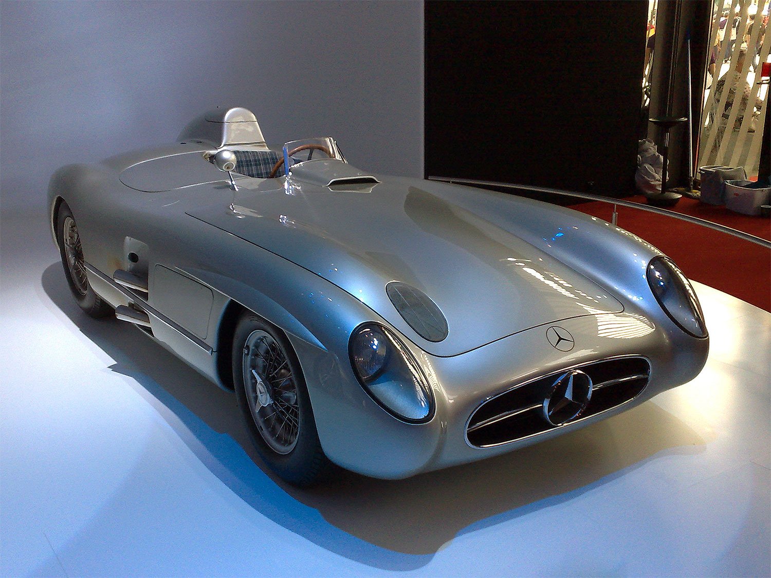 auf der IAA 2009